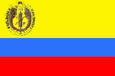 Bandera nacional de la República de Colombia del 4 de octubre de 1821 con el escudo de armas en la franja amarilla.